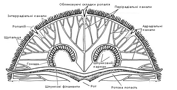 Горизонтальний розріз сцифоїдної медузи